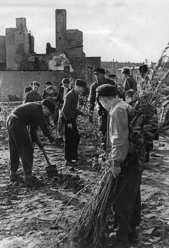 Kiel, Aufforstung durch Schuljugend Quartaner forsten auf ... Seit einigen Tagen wird in Kiel auf Veranlassung des Oberbürgermeisters Andreas Gayk die Bepflanzung der geräumten Trümmerflächen mit Mischwald, Erlen, Ulmen, Akazien, und Weiden durchgeführt. Auch die Schulkinder zwischen 12 und 15 Jahren müssen bei diesen Aufforstungsarbeiten täglich 4 Stunden helfen, um die Anpflanzung recht schnell zum Abschluss zu bringen. Unser Bild zeigt Quartaner der Hebbel-Schule in Kiel beim Pflanzen der jungen Bäumchen. For several days in Kiel, at the request of the Mayor Andreas Gayk, planting the cleared rubble areas with mixed trees including alder, elm, acacia, and willow. Even school children between 12 and 15 years must help every day in this reforestation work. The picture shows youth from the Quartaner Hebbel school in Kiel during the planting of saplings. 30-10-48 Illus-dpd 2386-48